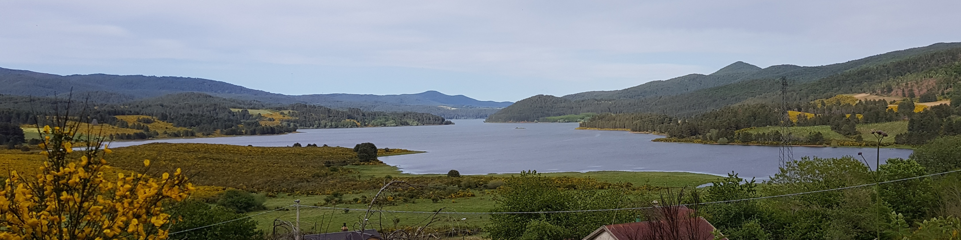 Lago Arvo